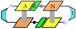 ARNI ein selbstreplizierendes,künstliches Molekül; selbst erstellt